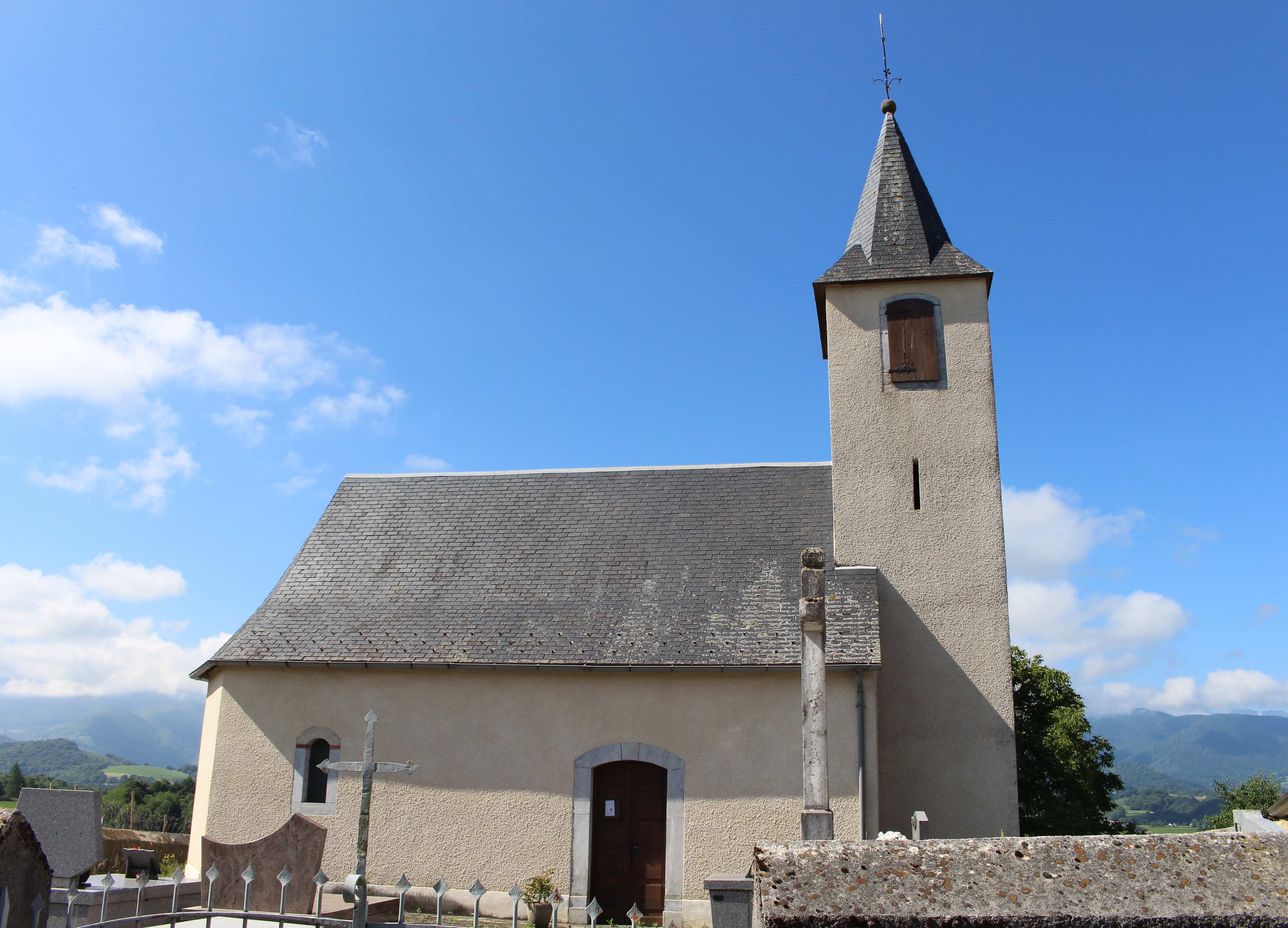 Église Sainte-Barbe de Molère (Hautes-Pyrénées)